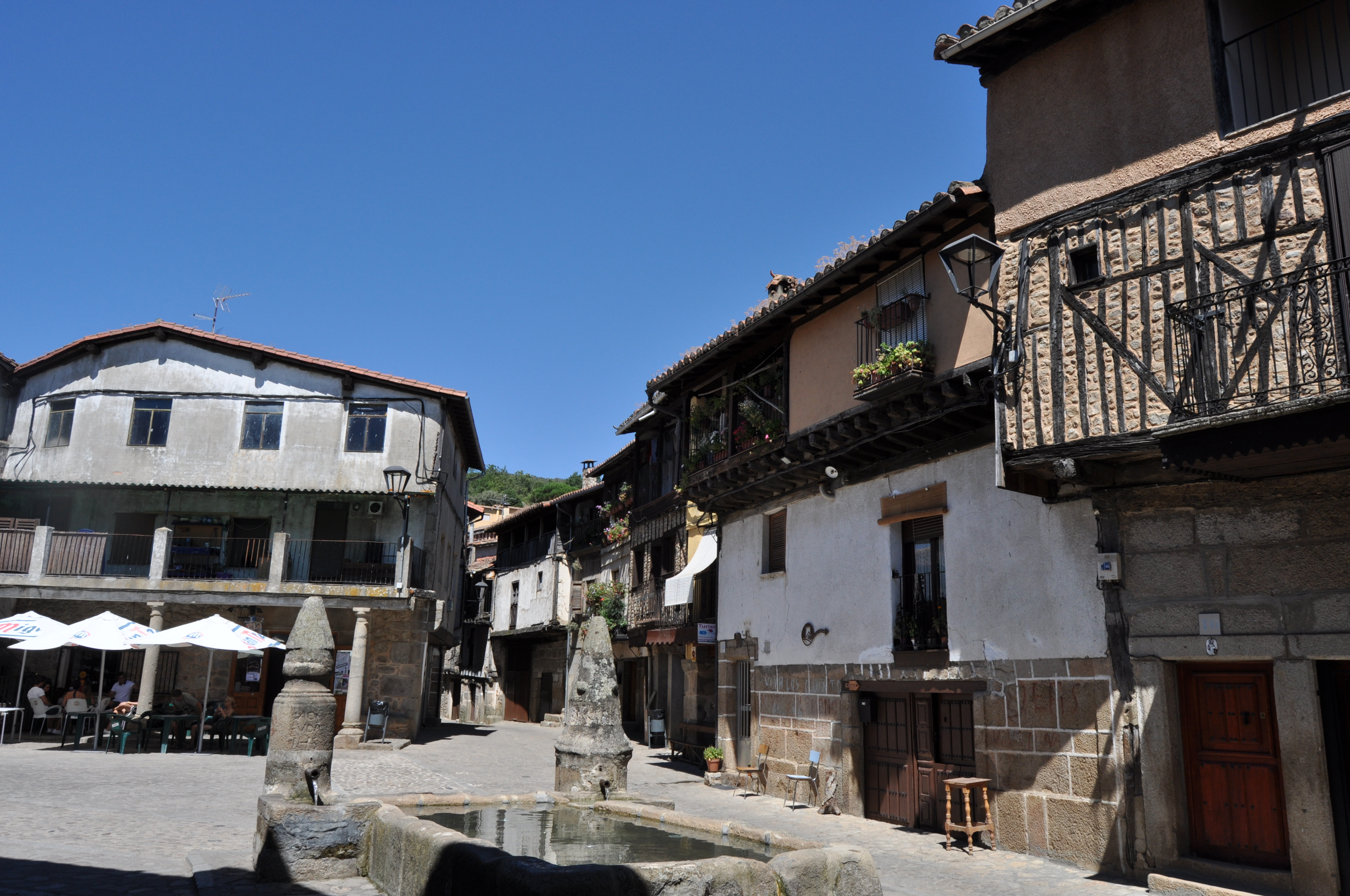 San Martín del Castañar - 006